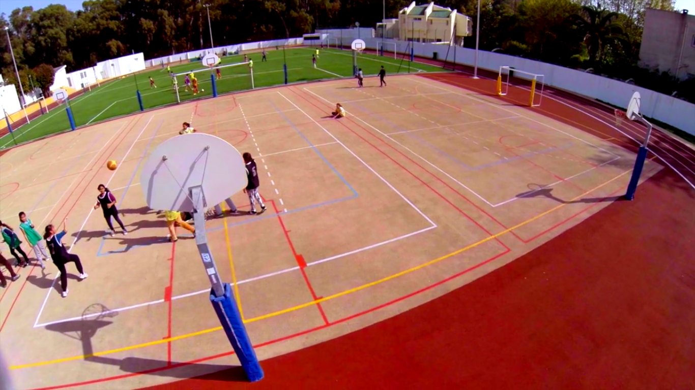 Terrains de basket, piste d'athlétisme et terrain de football/rugby au lycée Descartes